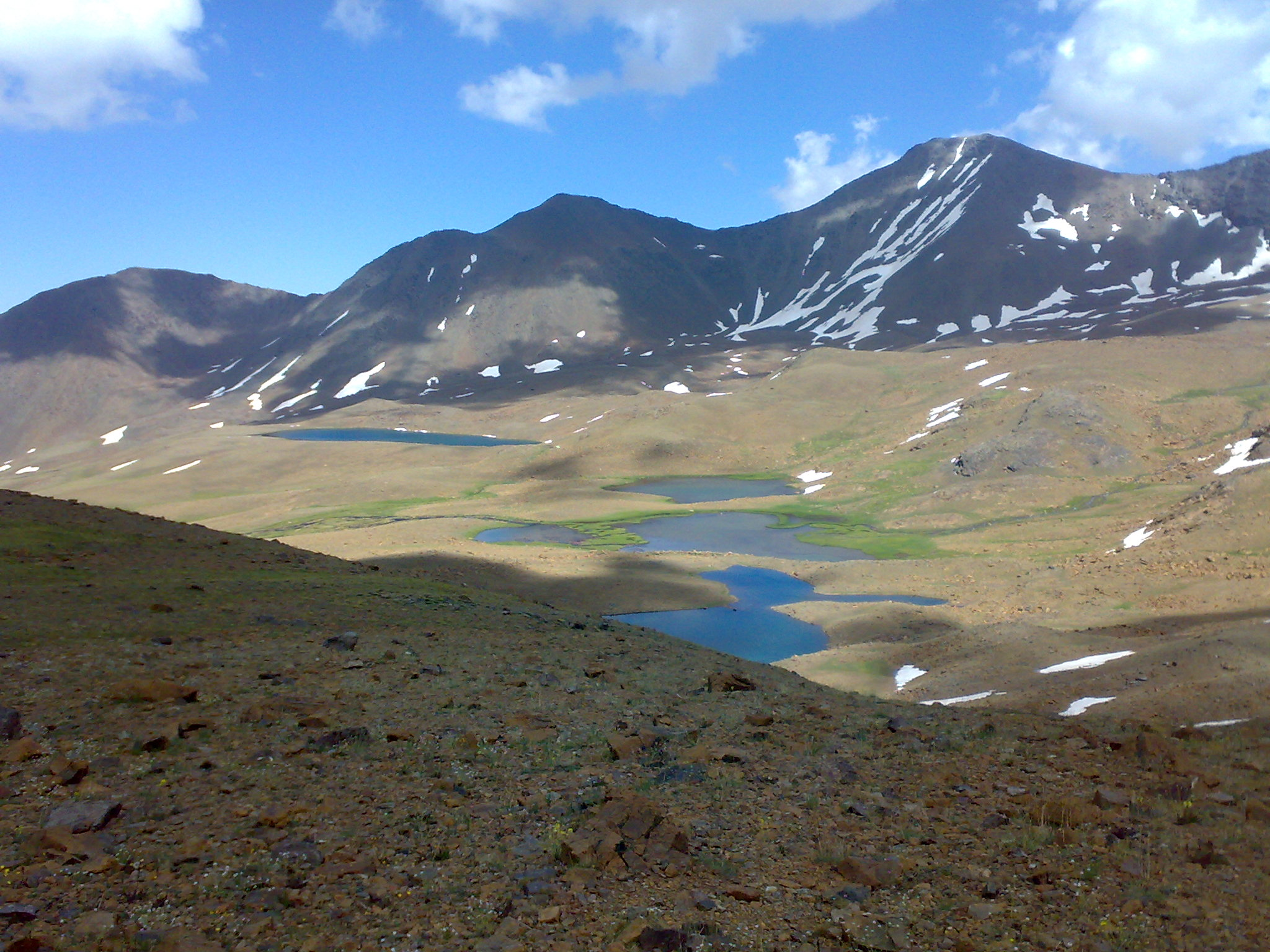 yedigöller